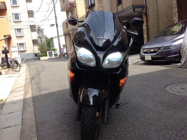 HONDA Forza Z(MF08) 後期 Sパッケージ